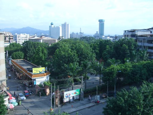 梅城赤岌岗一角